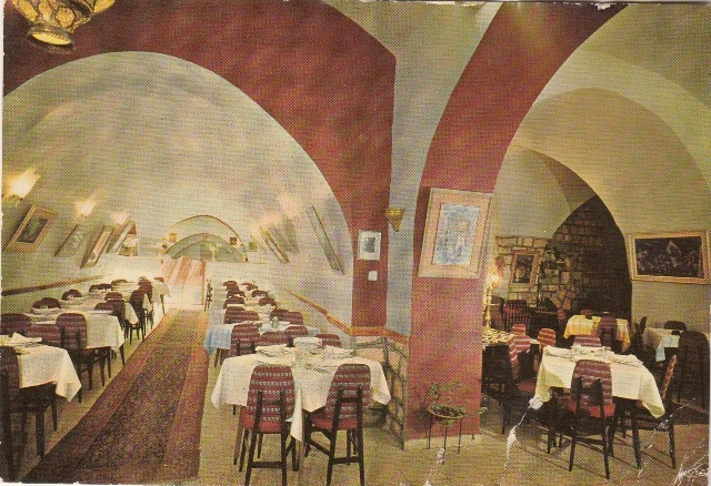 Hotel "Hertzliya" Safad